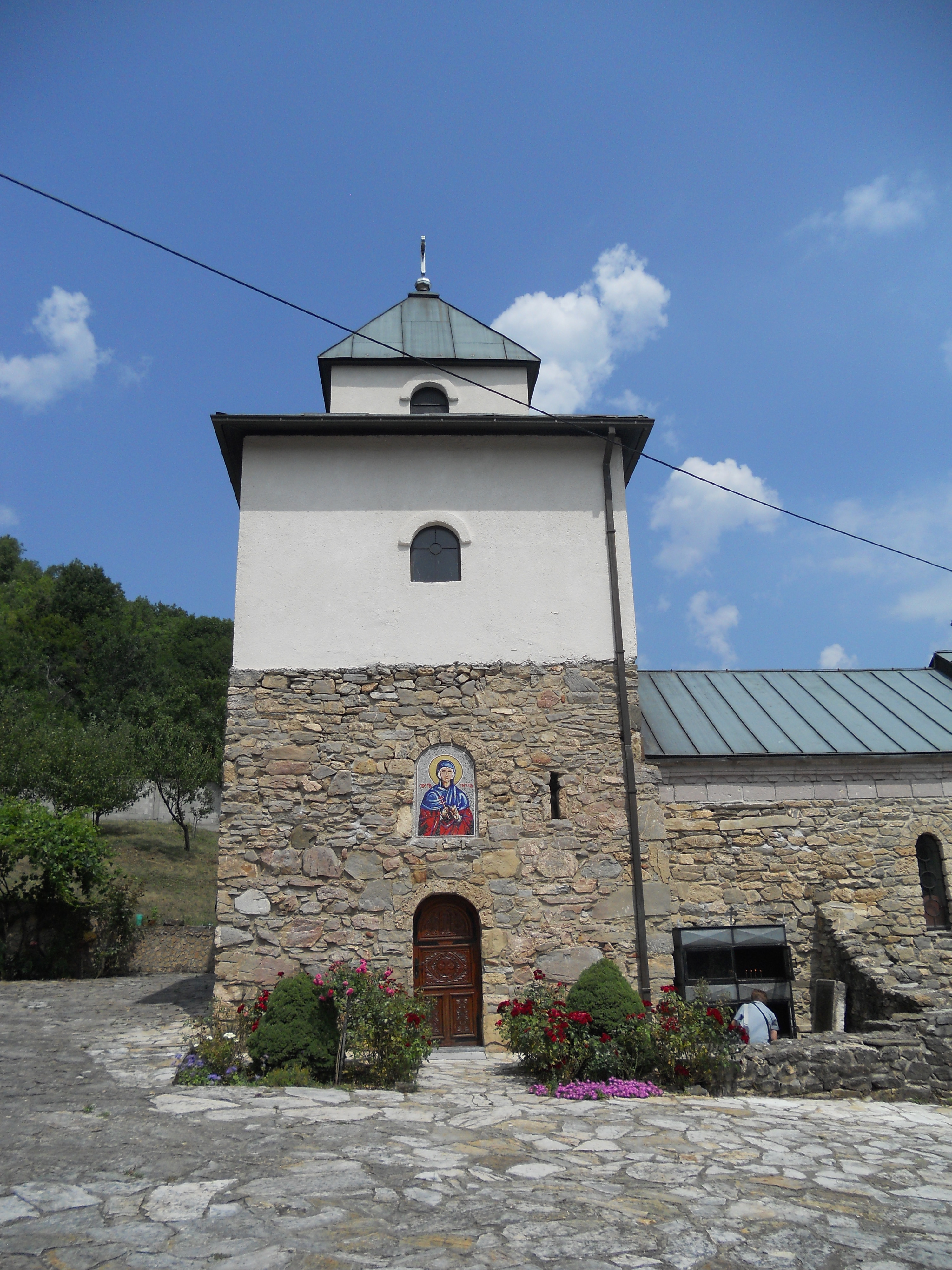 Manastir Petkovica Rudnička